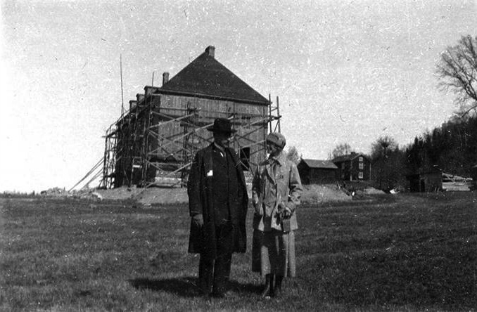 Fotografi